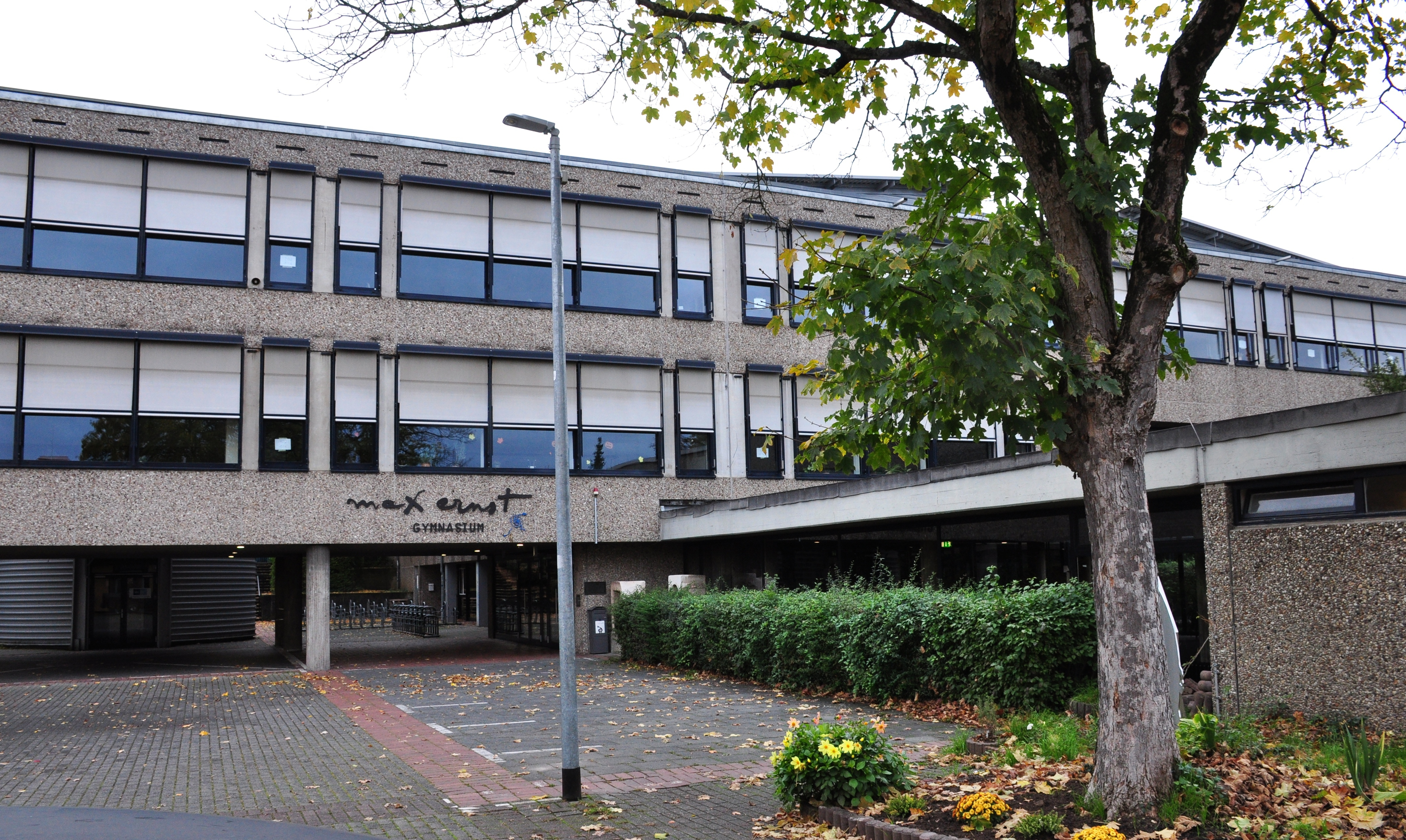 Max-Ernst-Gymnasium, Rodderweg 66, Brühl (Rheinland)